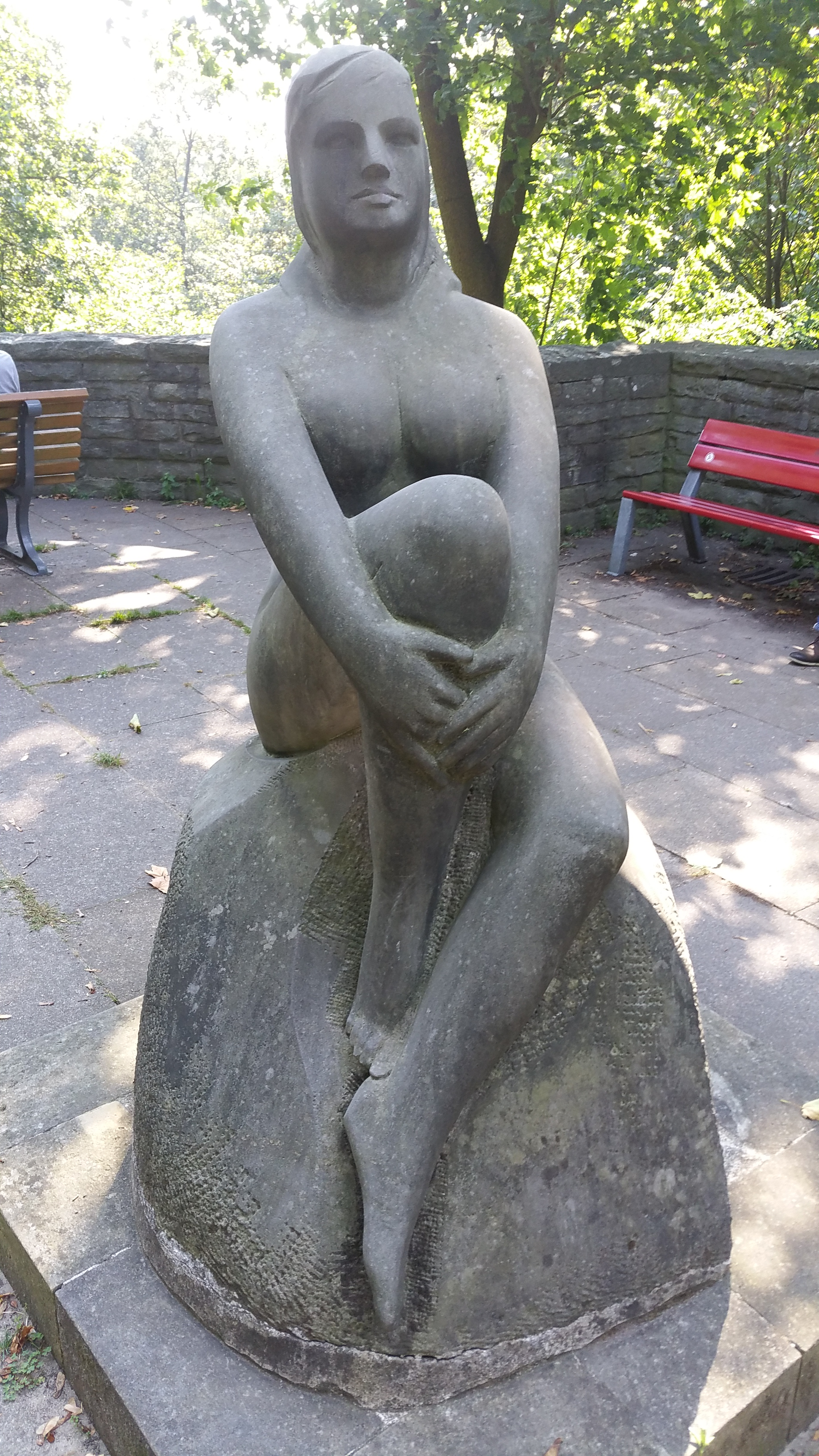 Statue von Rudolf Leptien, Sitzender Akt, ca. 1935, Standort Kriegsschule 2, heute Krankenhaus Havelhöhe